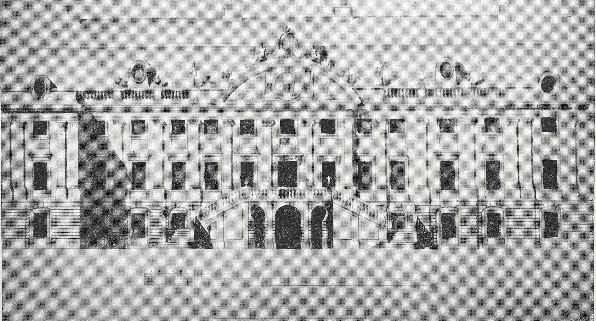 Pałac przebudowany w latach 1737-1743 za Jana Tarły wg projektu Franciszka Mayera oraz w latach 1766-1773 wg projektu Dominika Merliniego i Franciszka Ferdynanda Naxa (za projekty zapłacono Jakubowi Fontanie). W XIX wieku przebudowany.